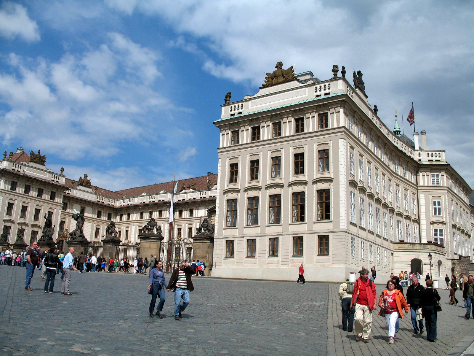 Pražský hrad, Nový královský palác, vlevo 1. hradní nádvoří